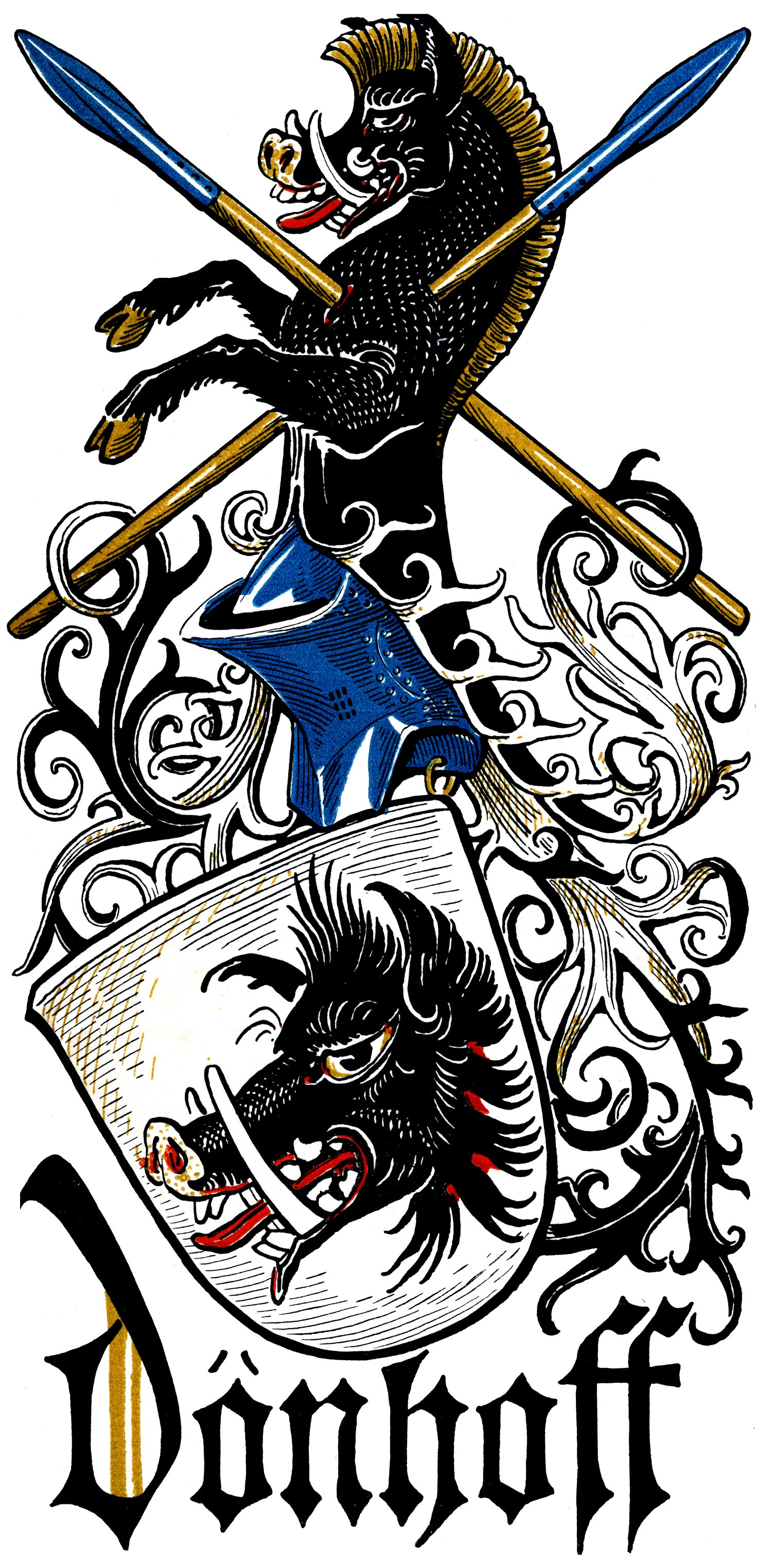 Wappen derer von Dönhoff